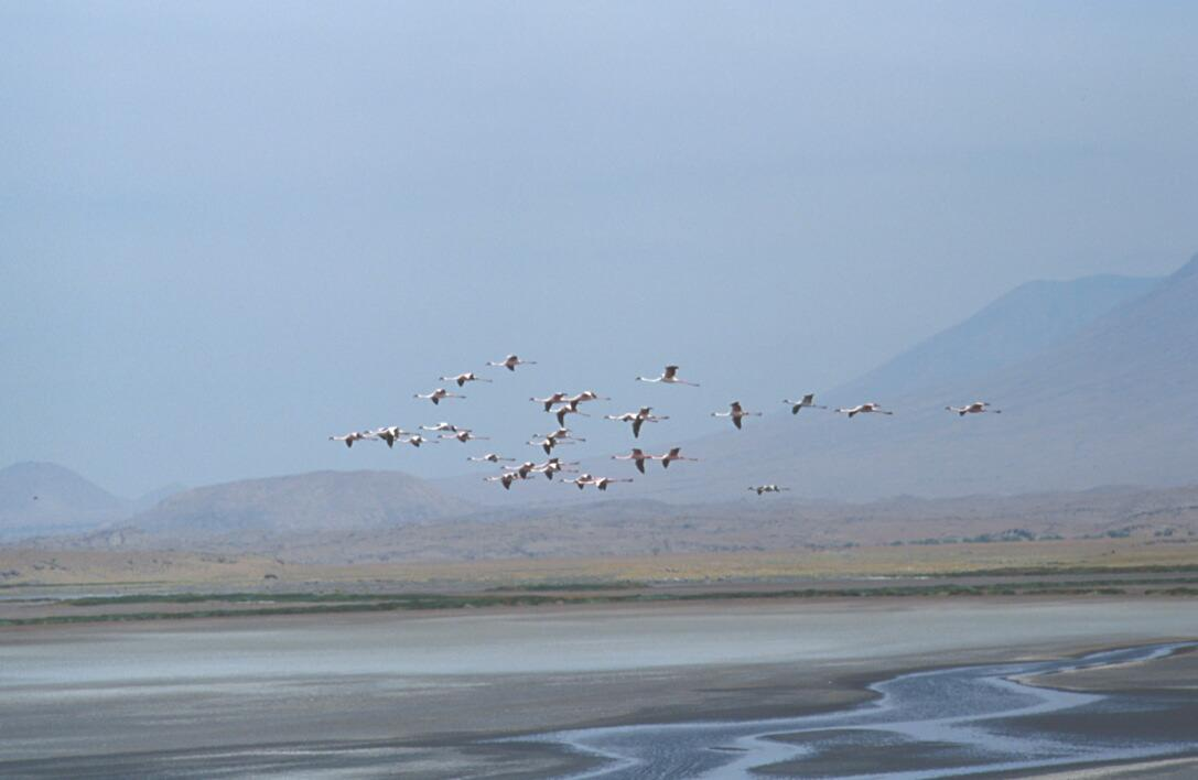 Flamingos am Lake Natron, Tansania